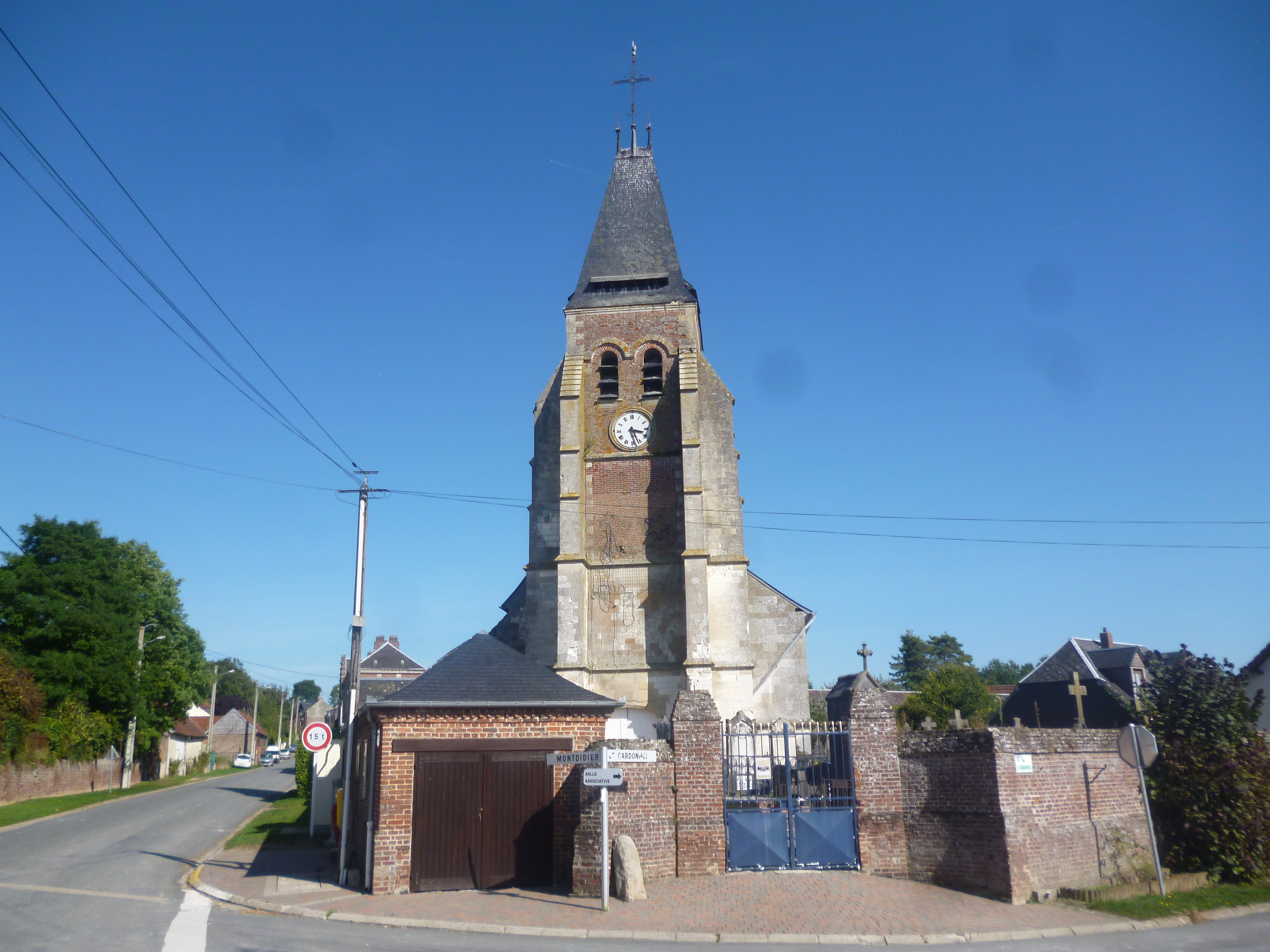 Eglise Saint-Nicolas de la commune de Broyes (Oise).